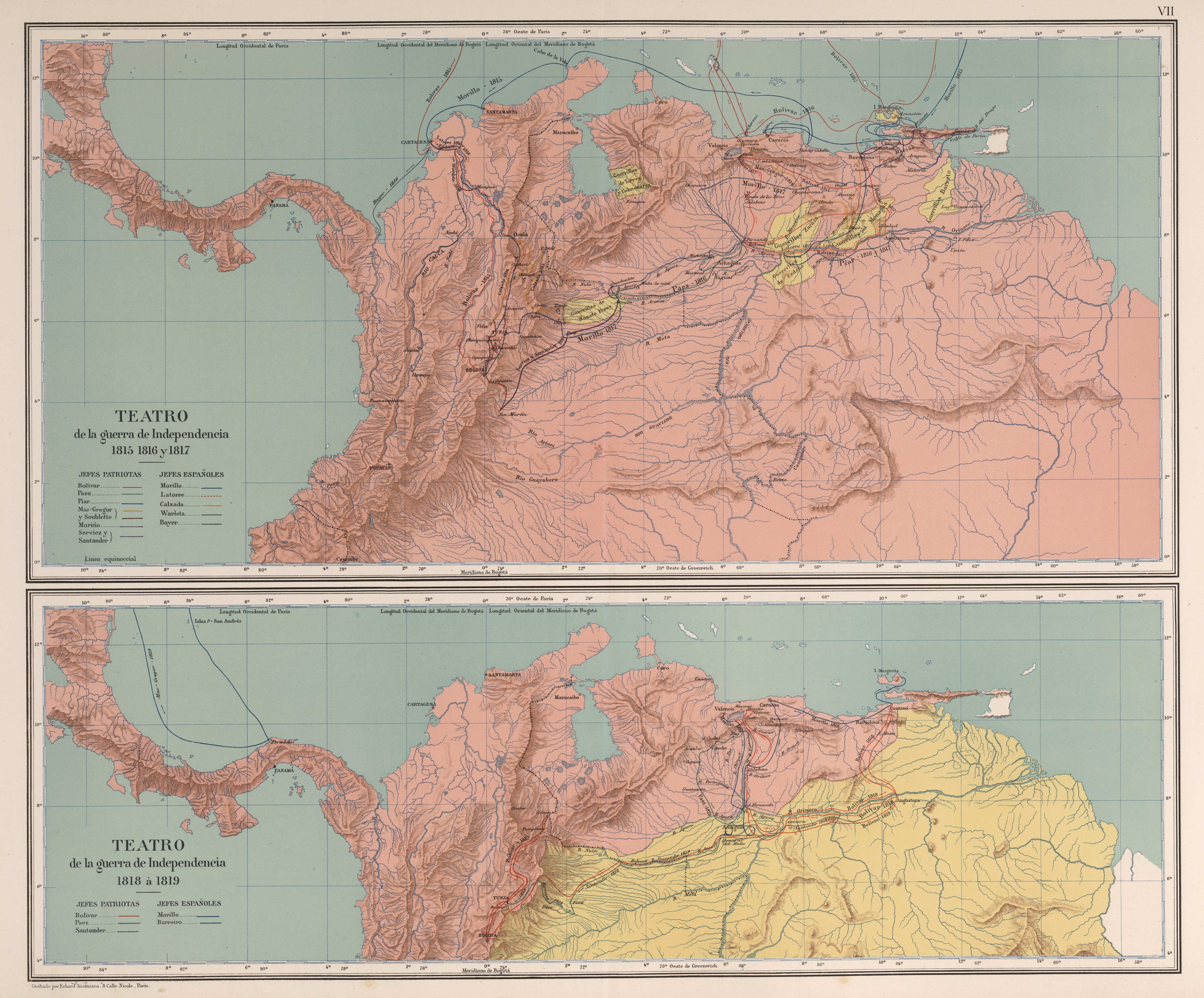 Carta que representa el teatro de la guerra de independencia años 1815 a 1819. Carta VII del Atlas geográfico e histórico de la República de Colombia, 1890.